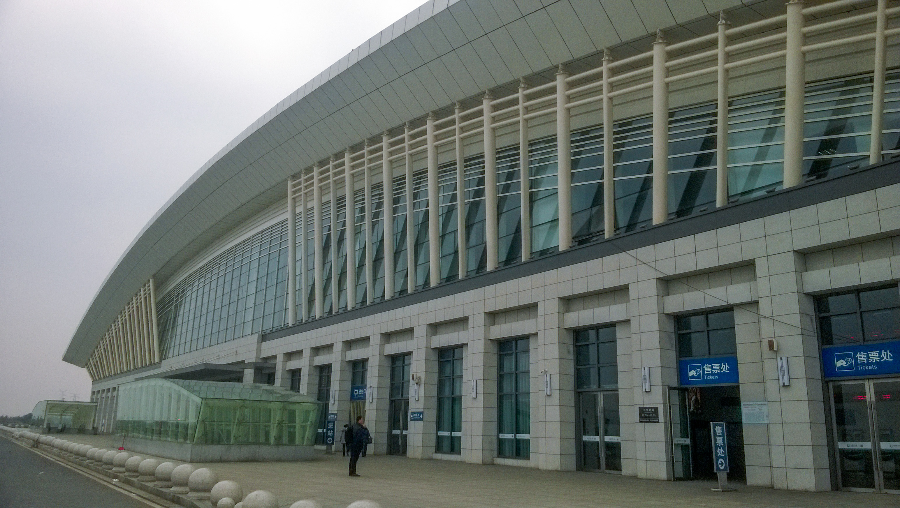 新余北站站房近景